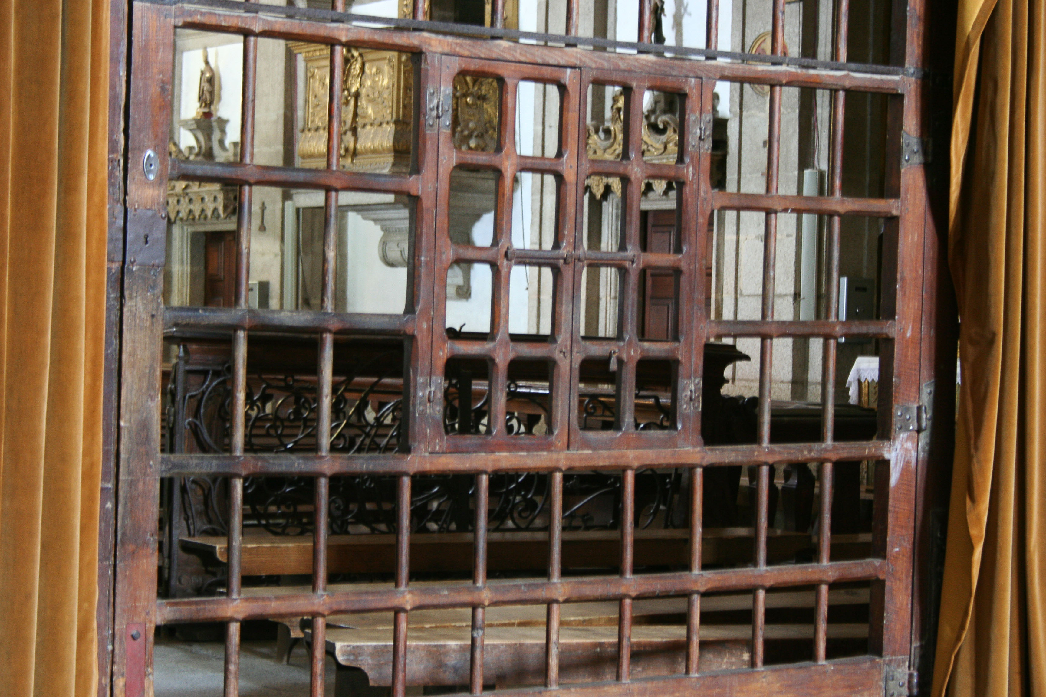 Detalhe do gradeamento que separa a igreja do cadeiral e que mantinha as monjas em clausura.